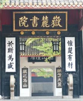 岳麓书院大门